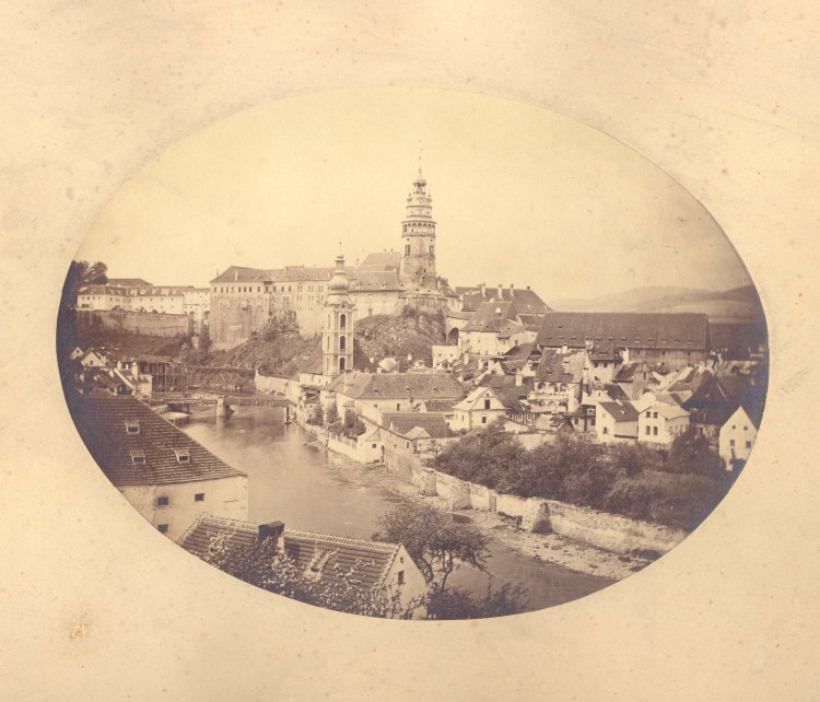 Pohled na Město Český Krumlov